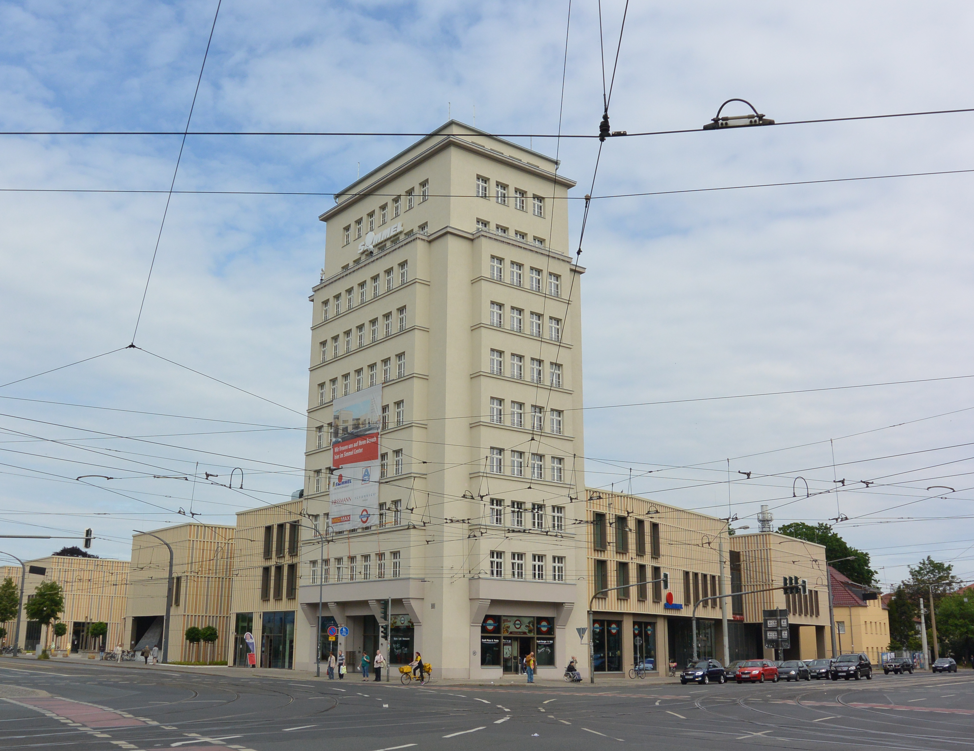 Das Hochhaus am Albertplatz nach seinem Umbau mit dem Anbau eines Einkaufszentrums